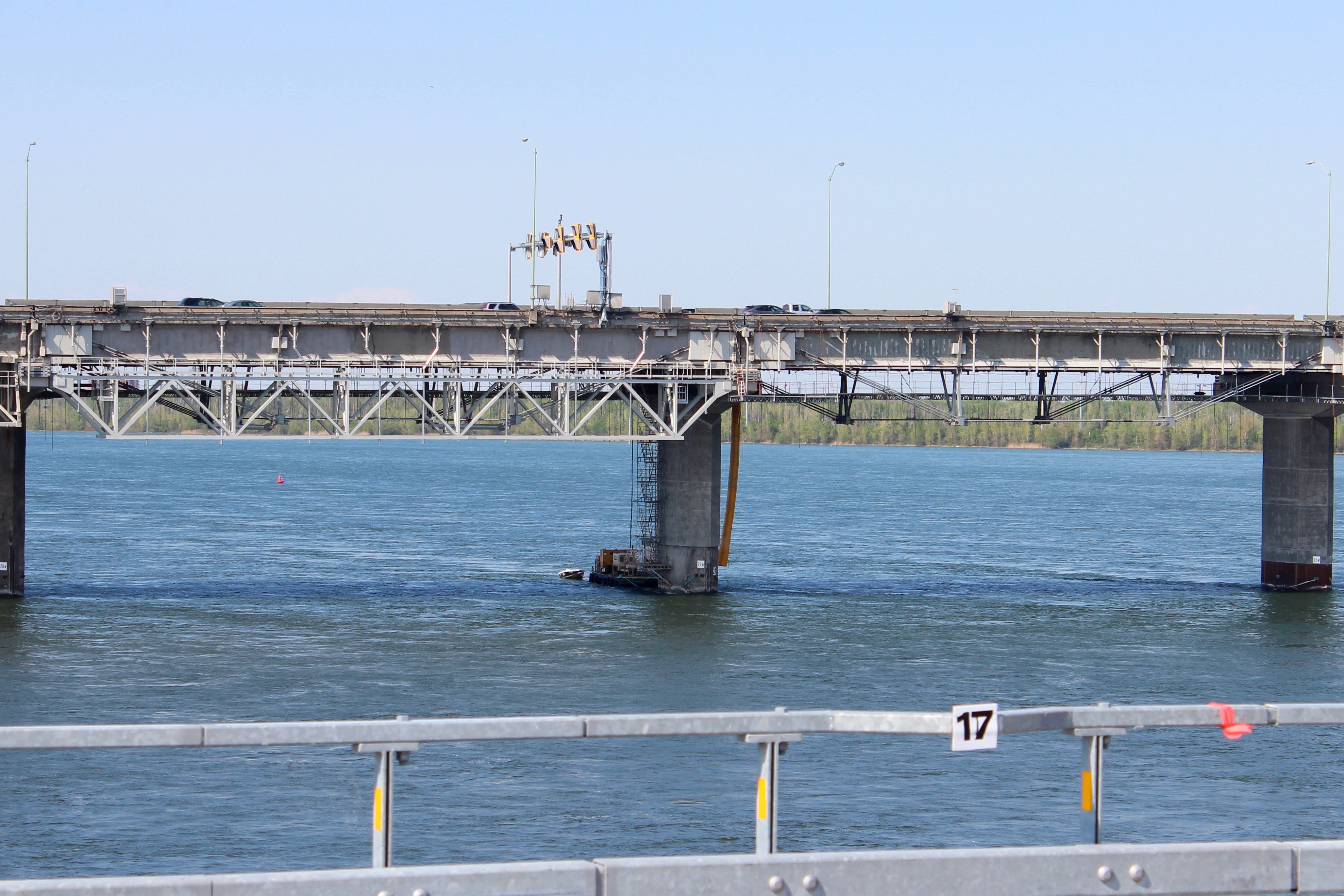 Structures de renfort du tablier (post-tension des poutres en béton extérieures), arbalètes et treillis.